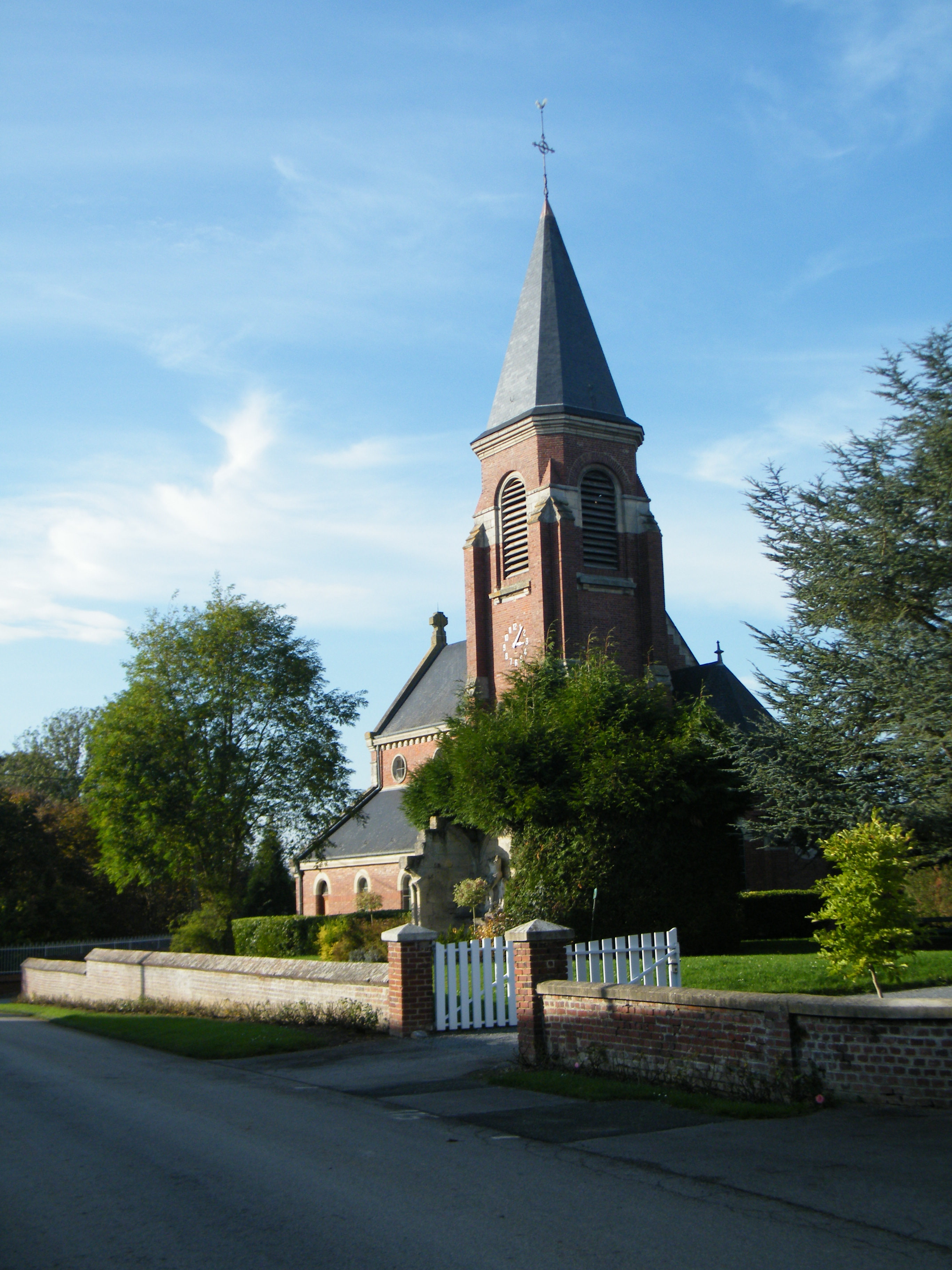 église.